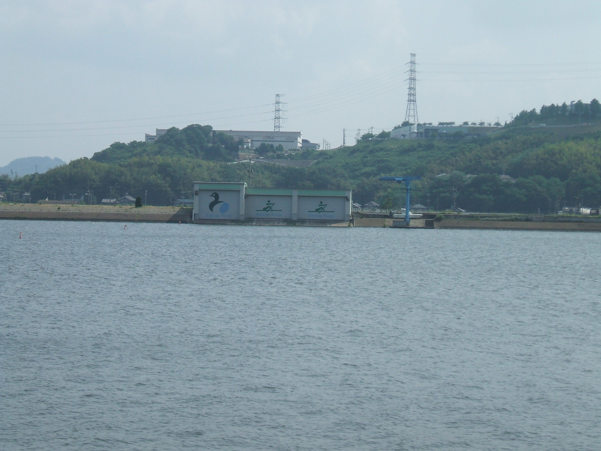 広島県福山市にある芦田川漕艇場のボート倉庫。芦田川河口堰によって生成された芦田川河口湖にある